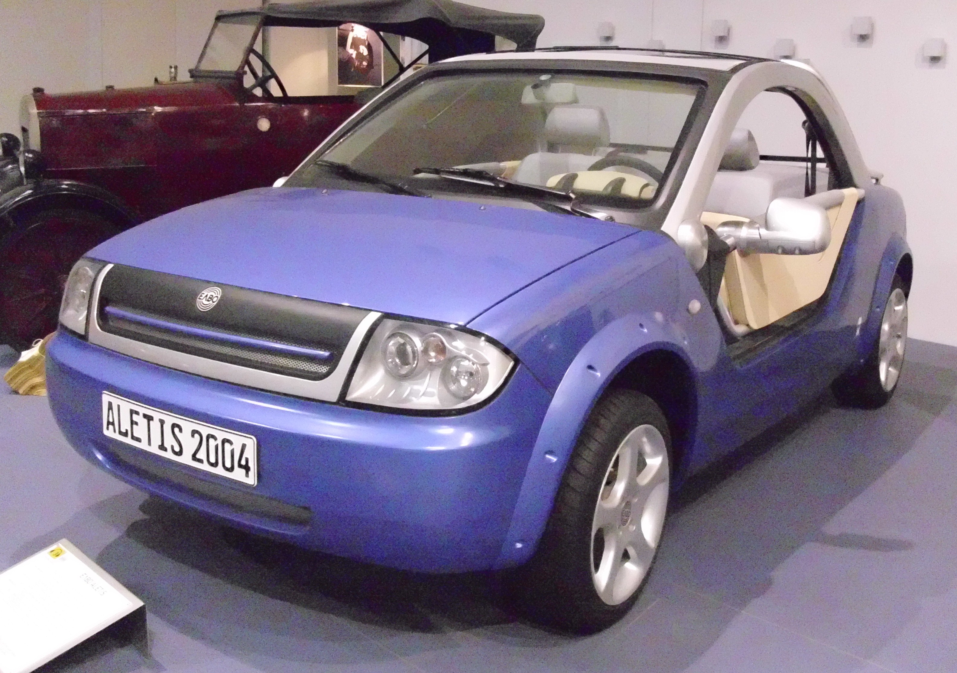 ELBO Aletis von 2001 im Noesis-Technikmuseum in Thessaloniki.